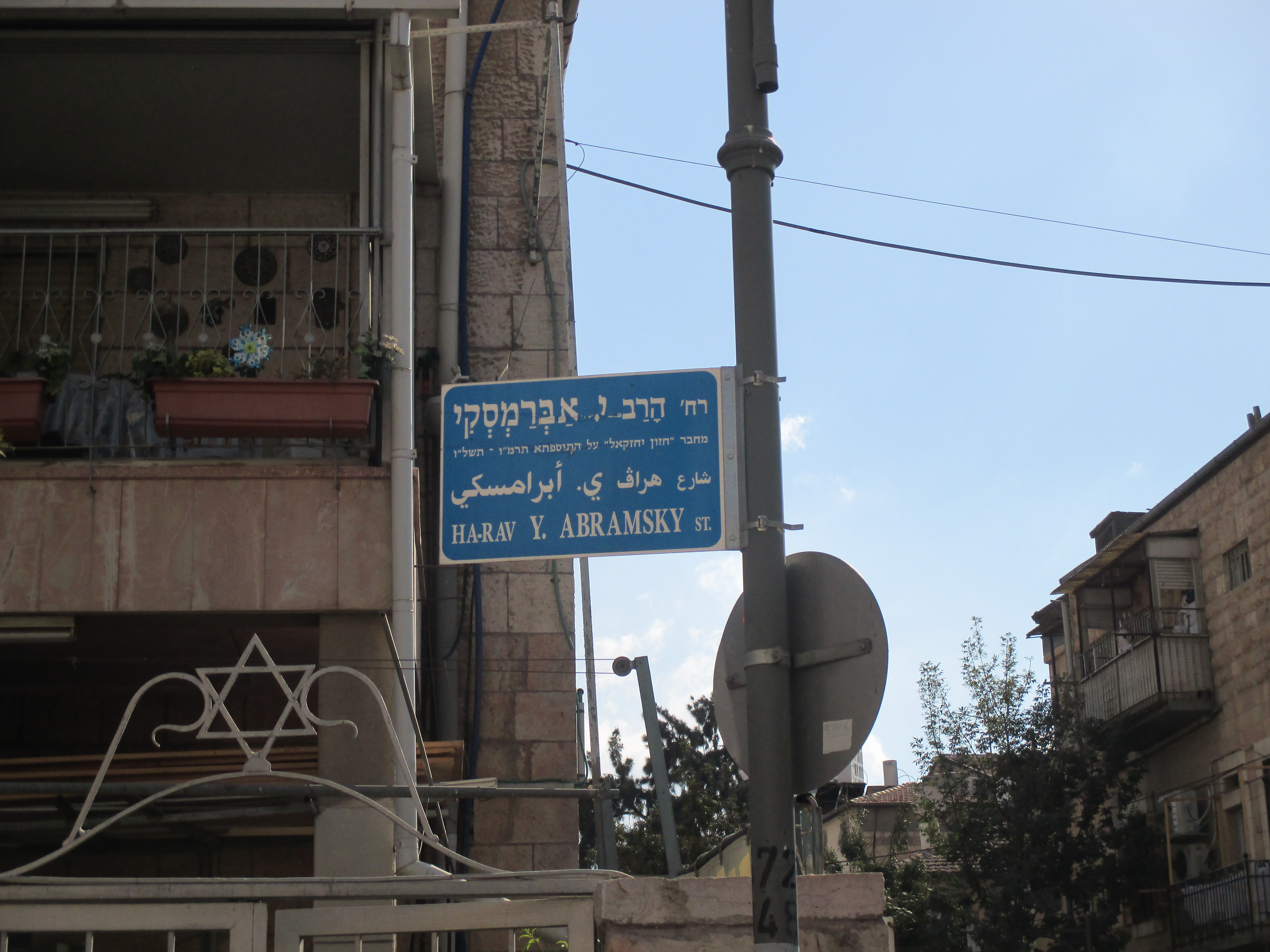 שלט רחוב על שם הרב יחזקאל אברמסקי